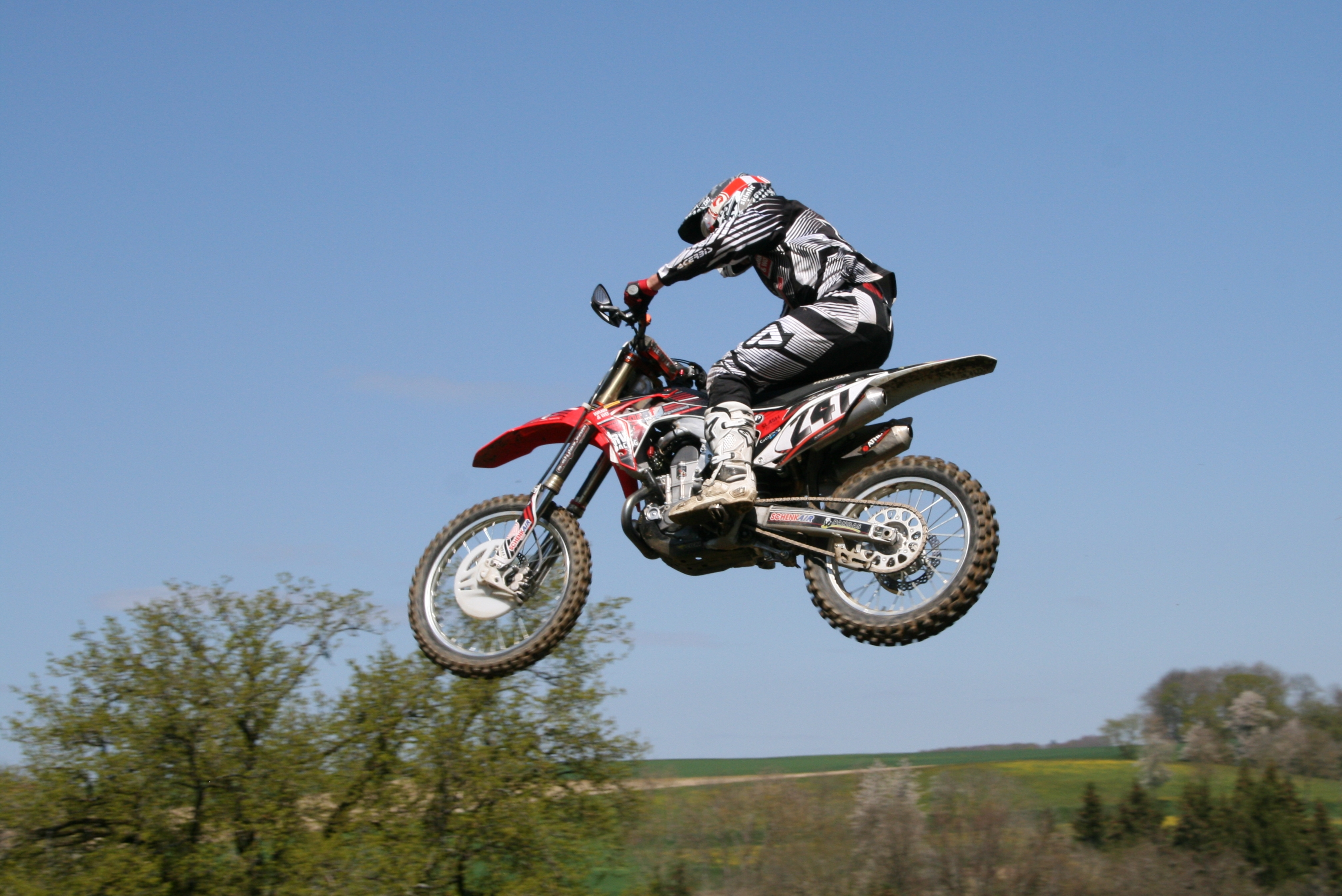 Sprung an einer Mottocrossveranstalltung in Payerne